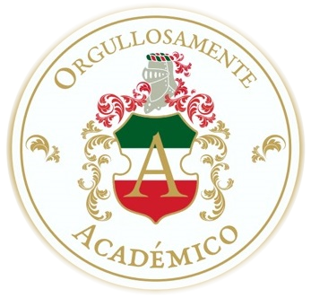 Escudo de la Institución Educativa Académico, Cartago, Valle del Cauca, Colombia.